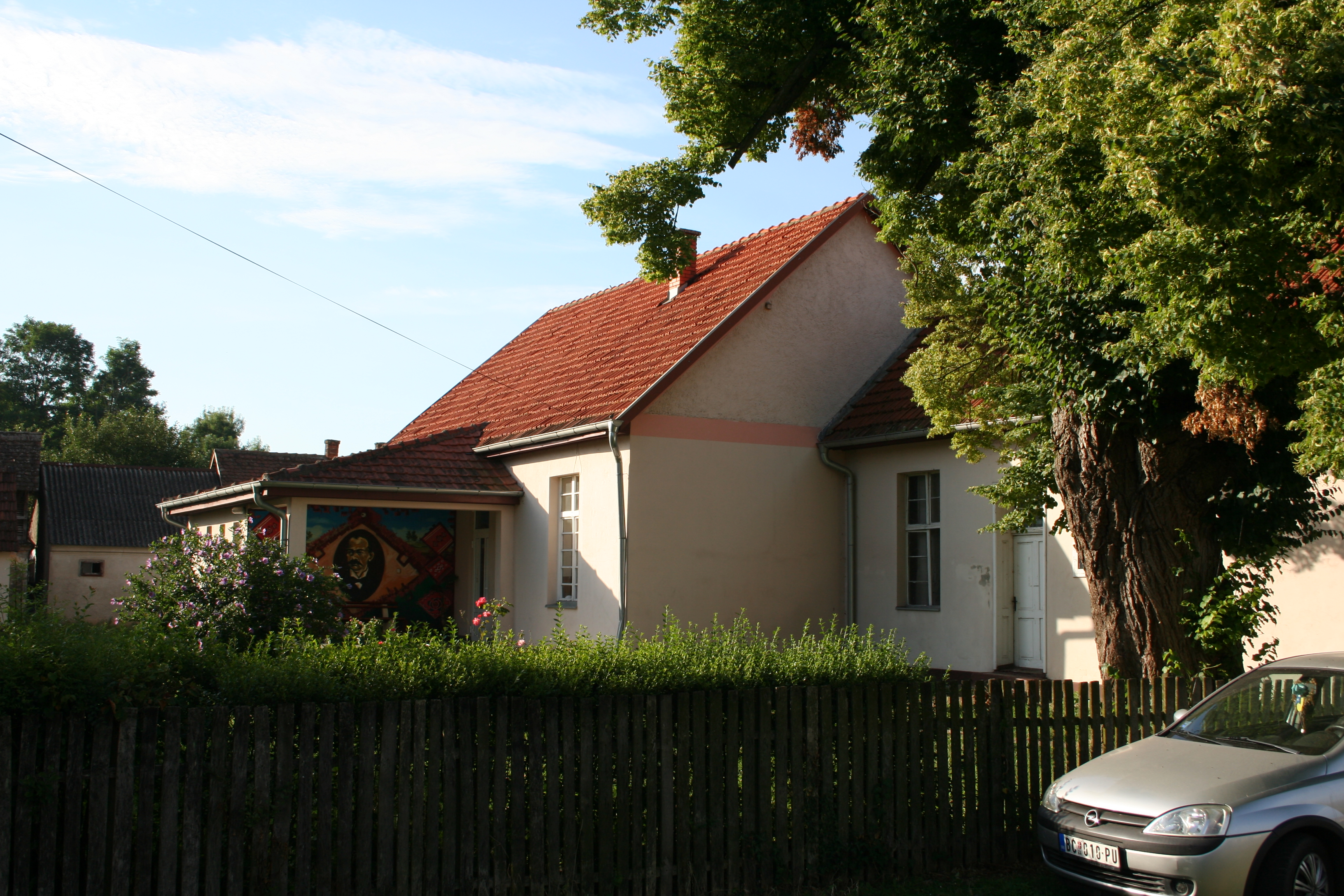 Seoska škola, Sovljak